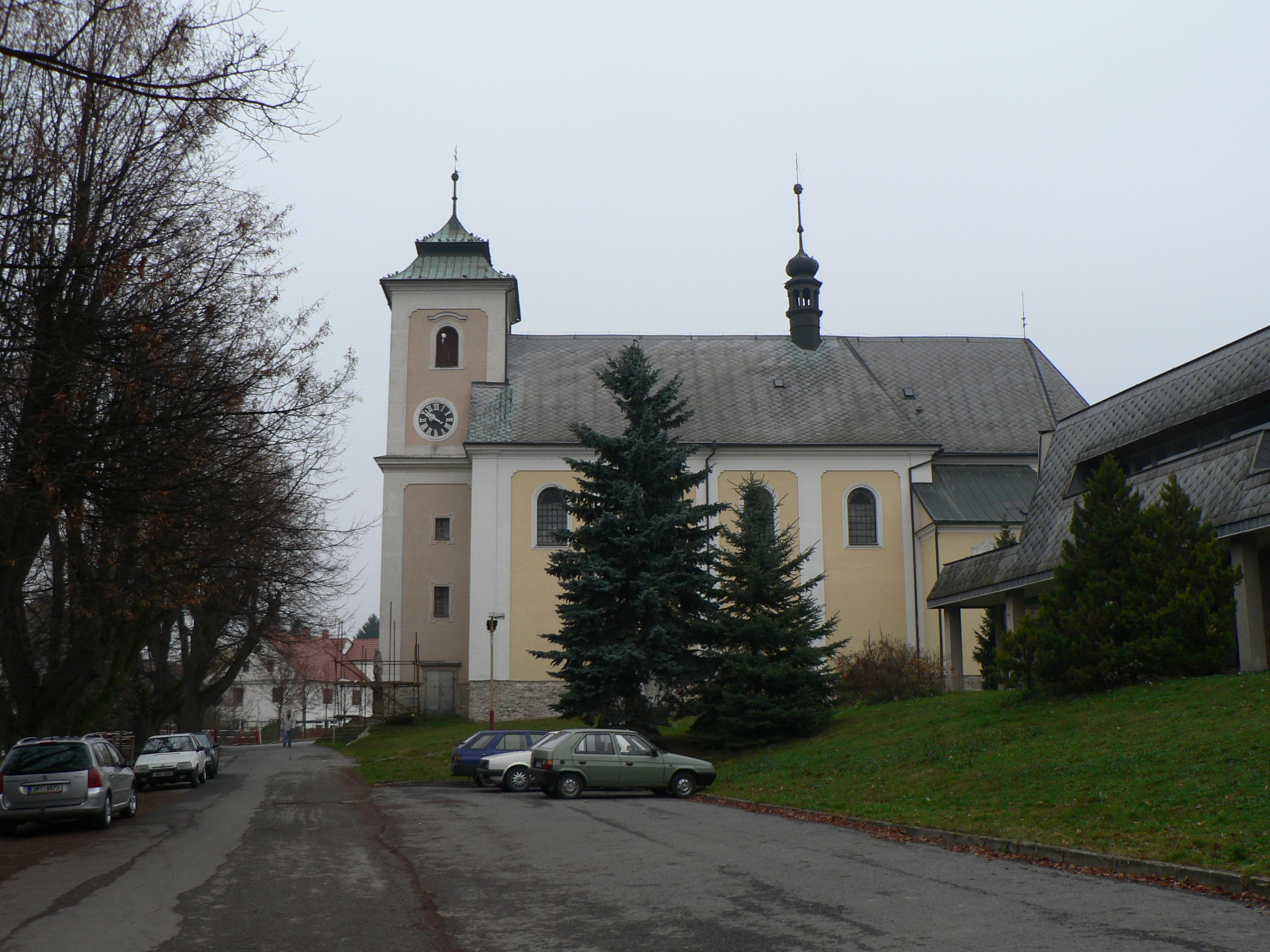 Kostel svatého Jiří (Libina)